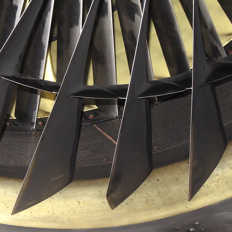 Лопатки вентилятора двигателя Д-36 (Як-42, Ан-72, Ан-74, в модификациях — Ми-26, Ан-148, Бе-200). Сперва — лопатки ротора с полками, образующими антивибрационный бандаж, за ним — глушитель шума и лопатки статора (спрямляющий аппарат)